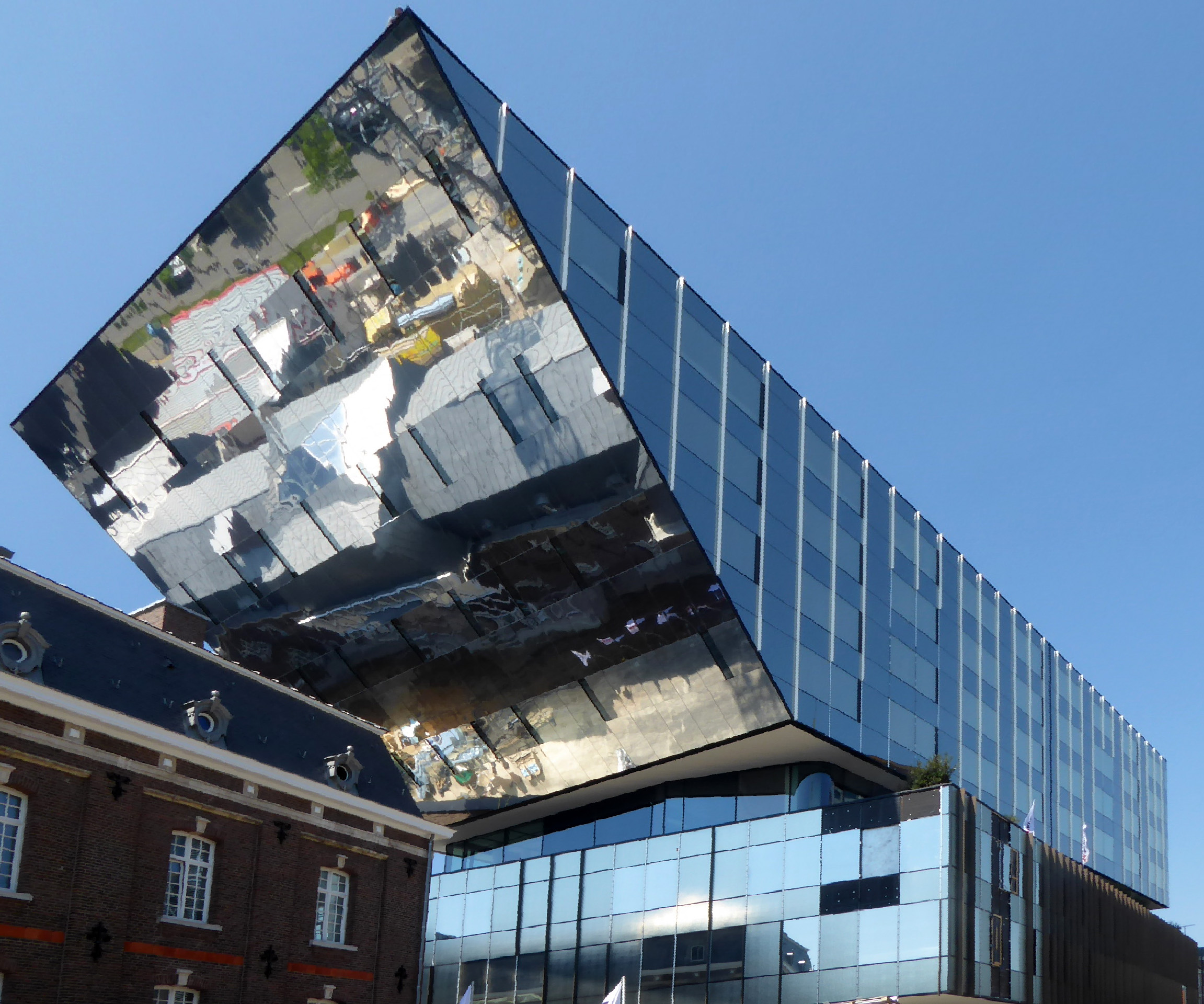 Nieuw Stadhuis in Hasselt